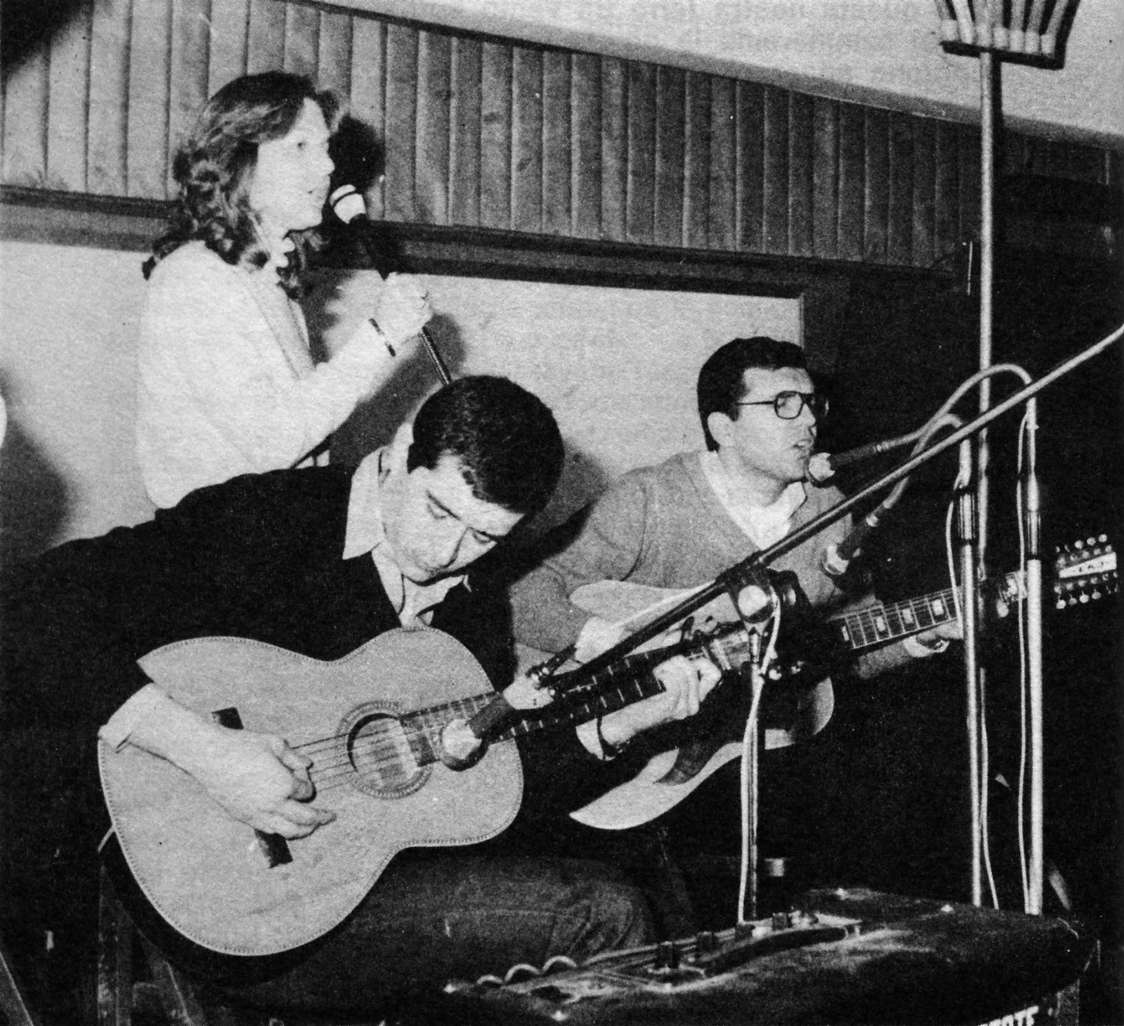 Gli Amici del Vento nel concerto "Musica per la Libertà" a Roma, spettacolo musicale organizzato dal Fronte della Gioventù e dal Centro Librario Dissenso in memoria delle vittime del terrorismo rosso ed in solidarietà con i giovani anticomunisti colpiti dalla repressione del sistema.